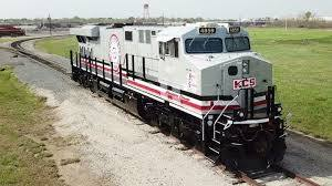 KCS Train Heriatge